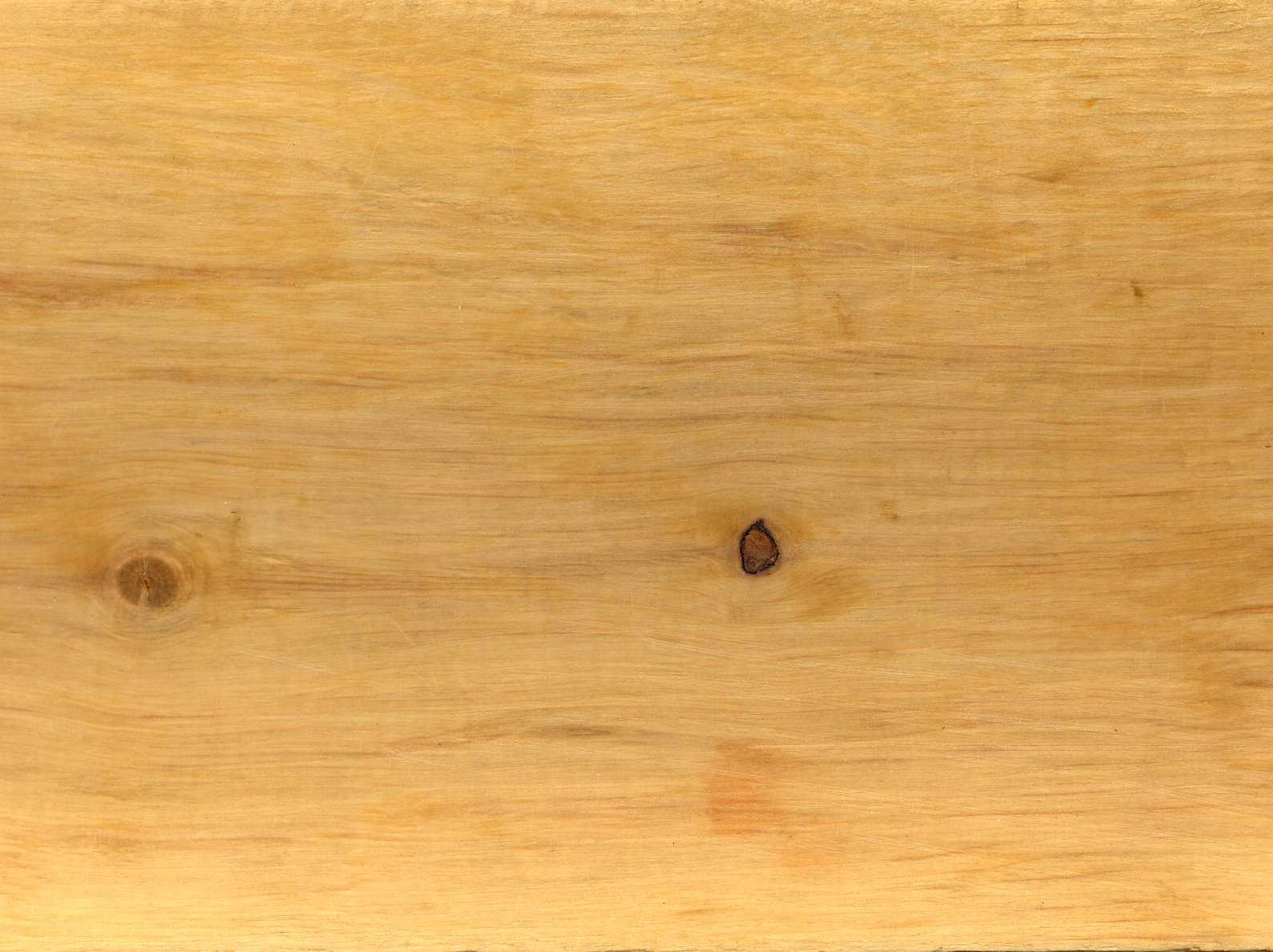 Carpinus betulus, przekrój styczny przez drewno graba zwyczajnego